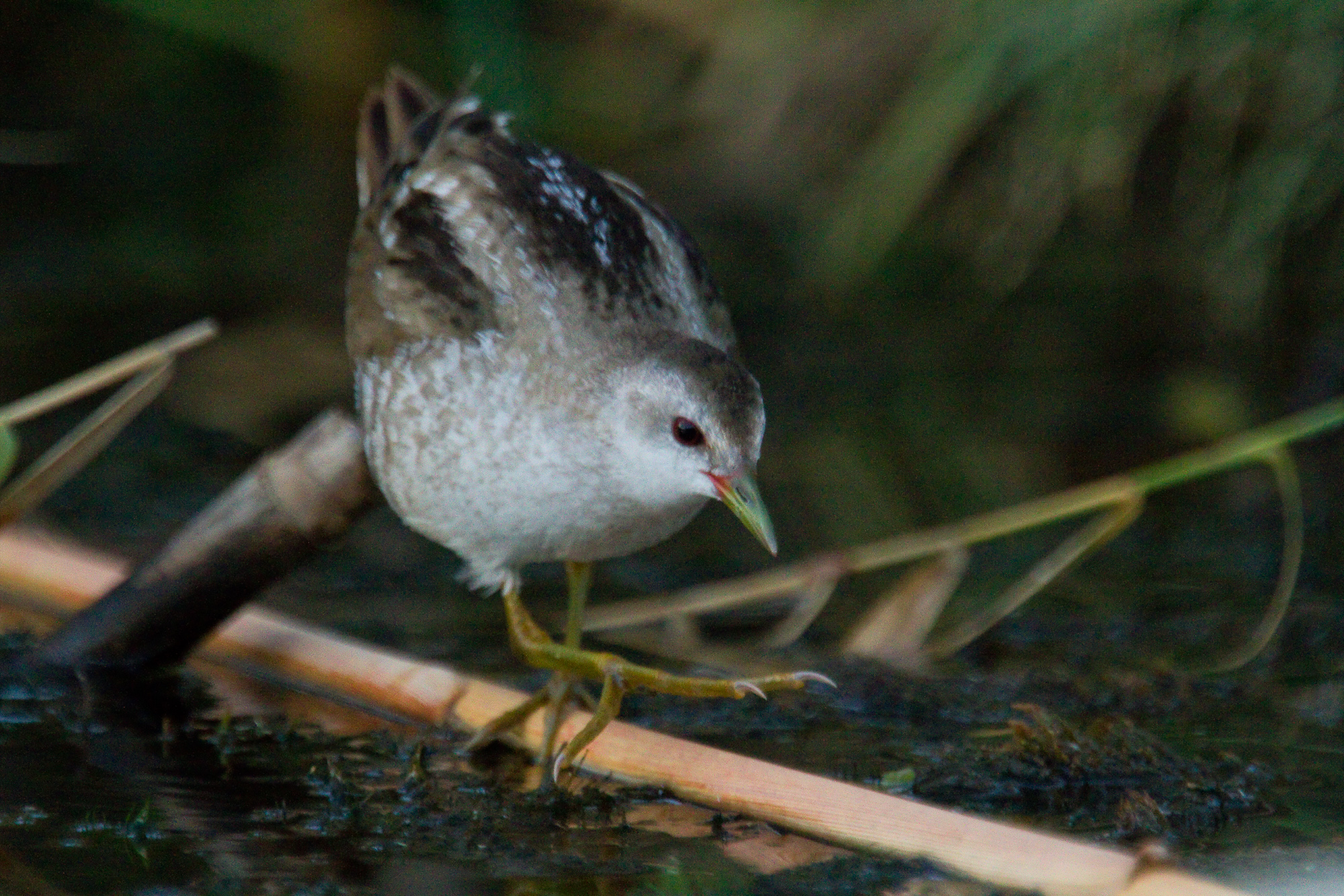 Klein waterhoen